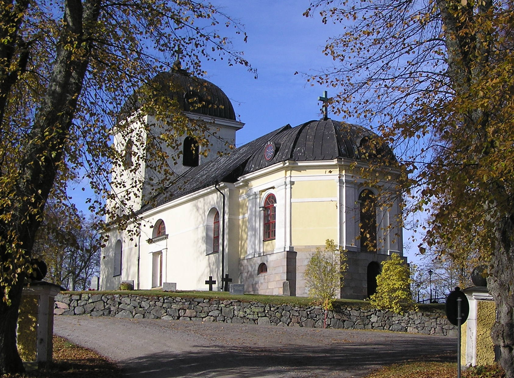 Hyltinge kyrka, Södermanland. Oktober 2007.